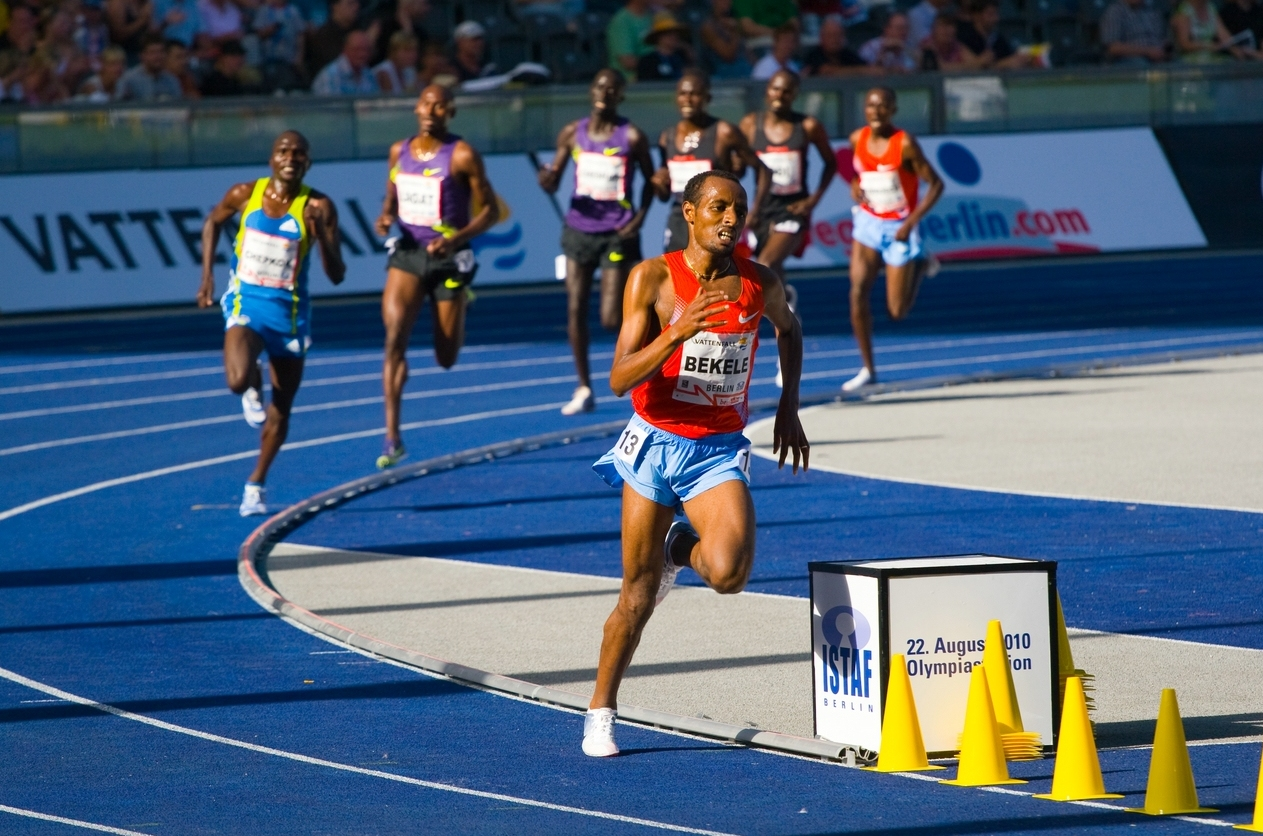 Tariku Bekele Sieger 3000m